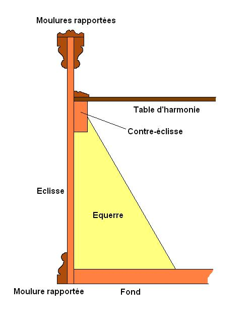 Structure interne d'un clavecin italien